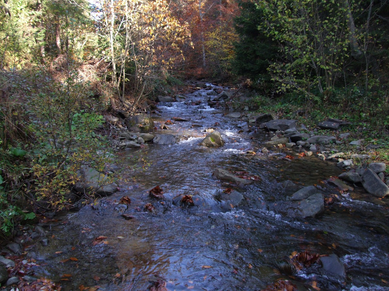 Potok Łopuszanka w środkowym biegu